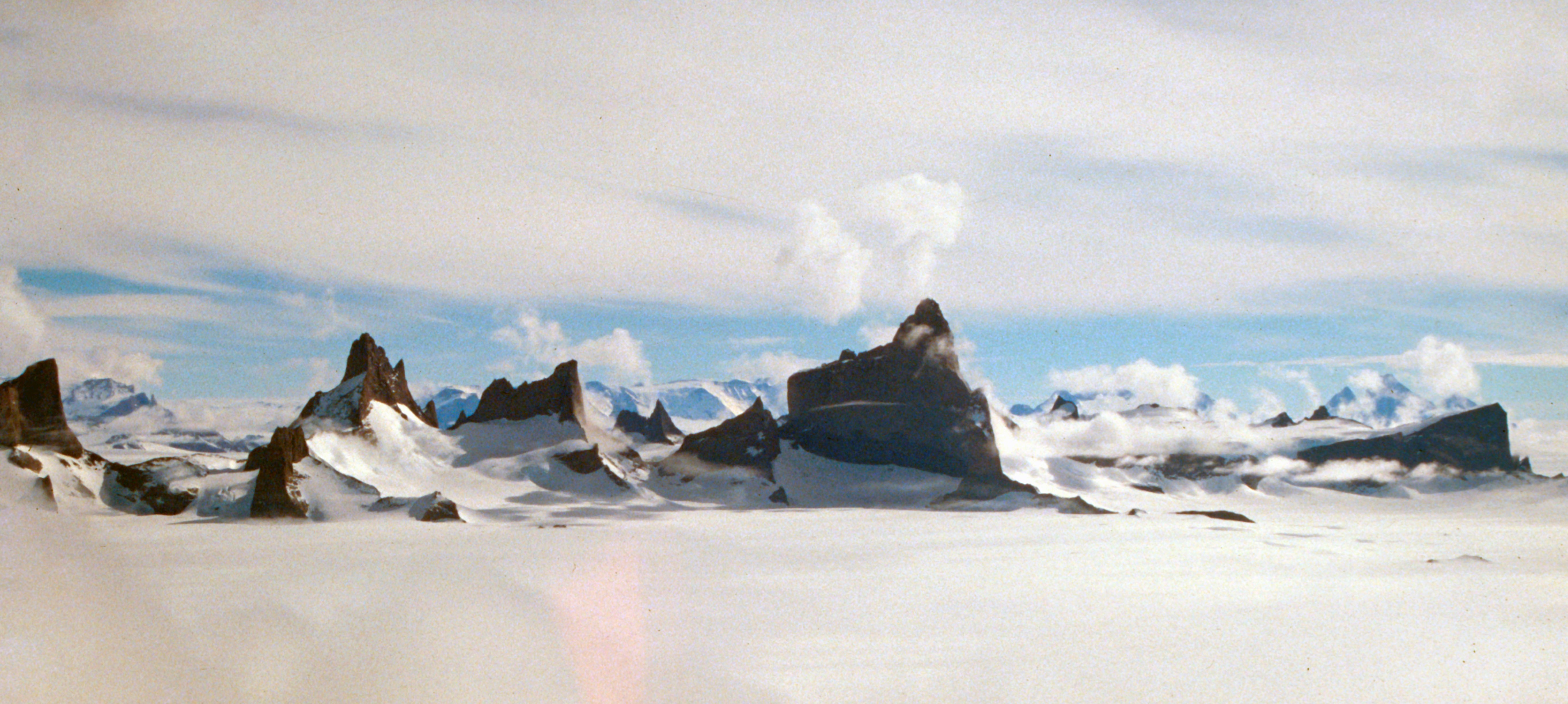 Drygalskiberge im zentralen Neuschwabenland, Blick von NordenNorsk bokmål: Drygalskifjella i Dronning Maud Land, Antarktis, sett fra nord